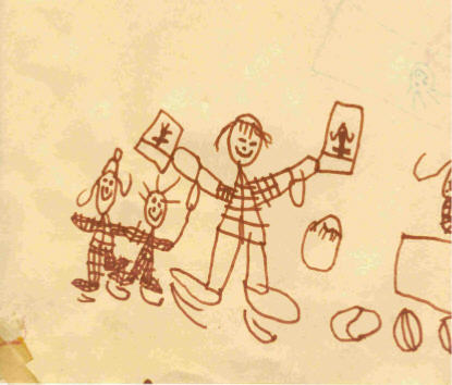 Kinderzeichnung: Mädchen und Junge werden fotografiert, 3 Jahre, 11 Monate